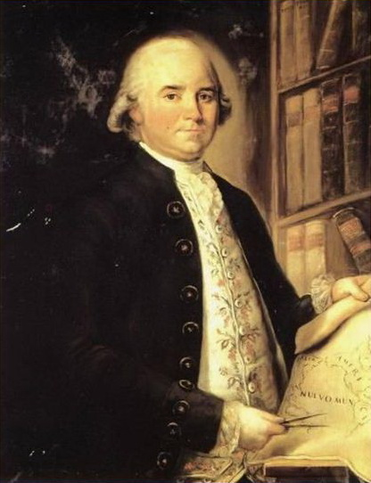 Retrato de Juan Bautista Muñoz, historiador español del siglo XVIII, cronista de Indias y partícipe en la creación del Archivo de Indias de Sevilla.